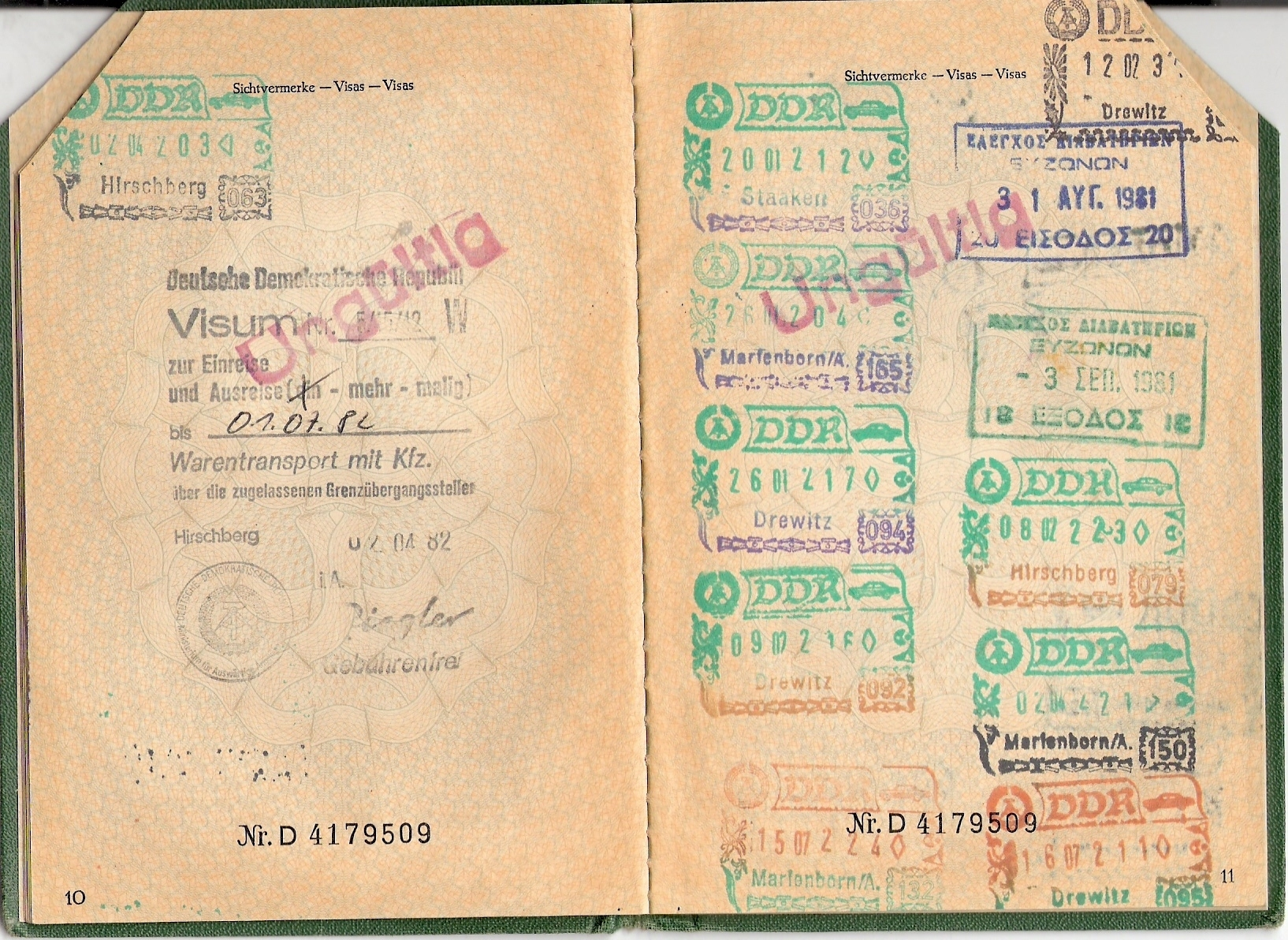 Passportstempel zur Einreise in die DDR zur Güterbeförderung